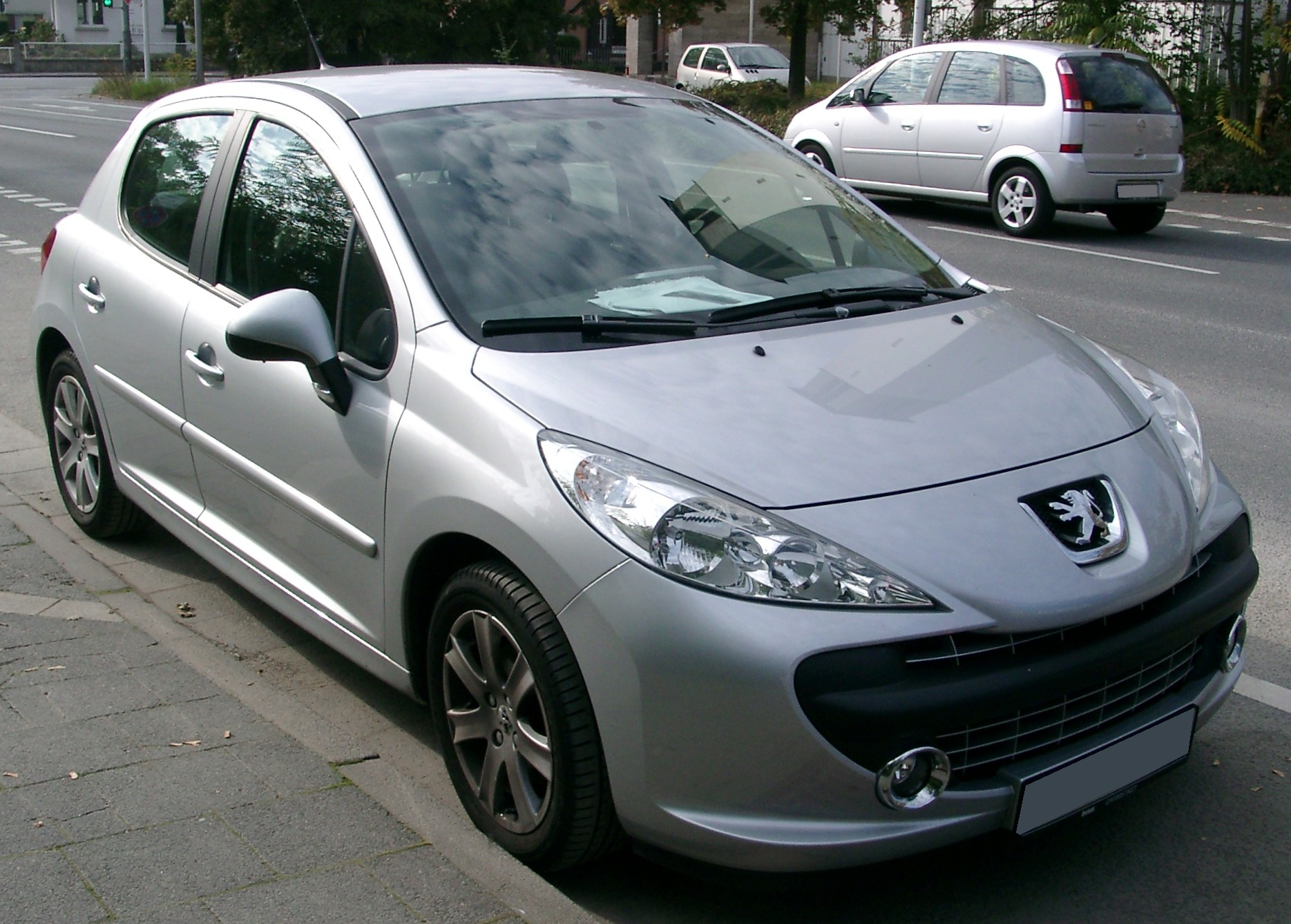 Peugeot 207